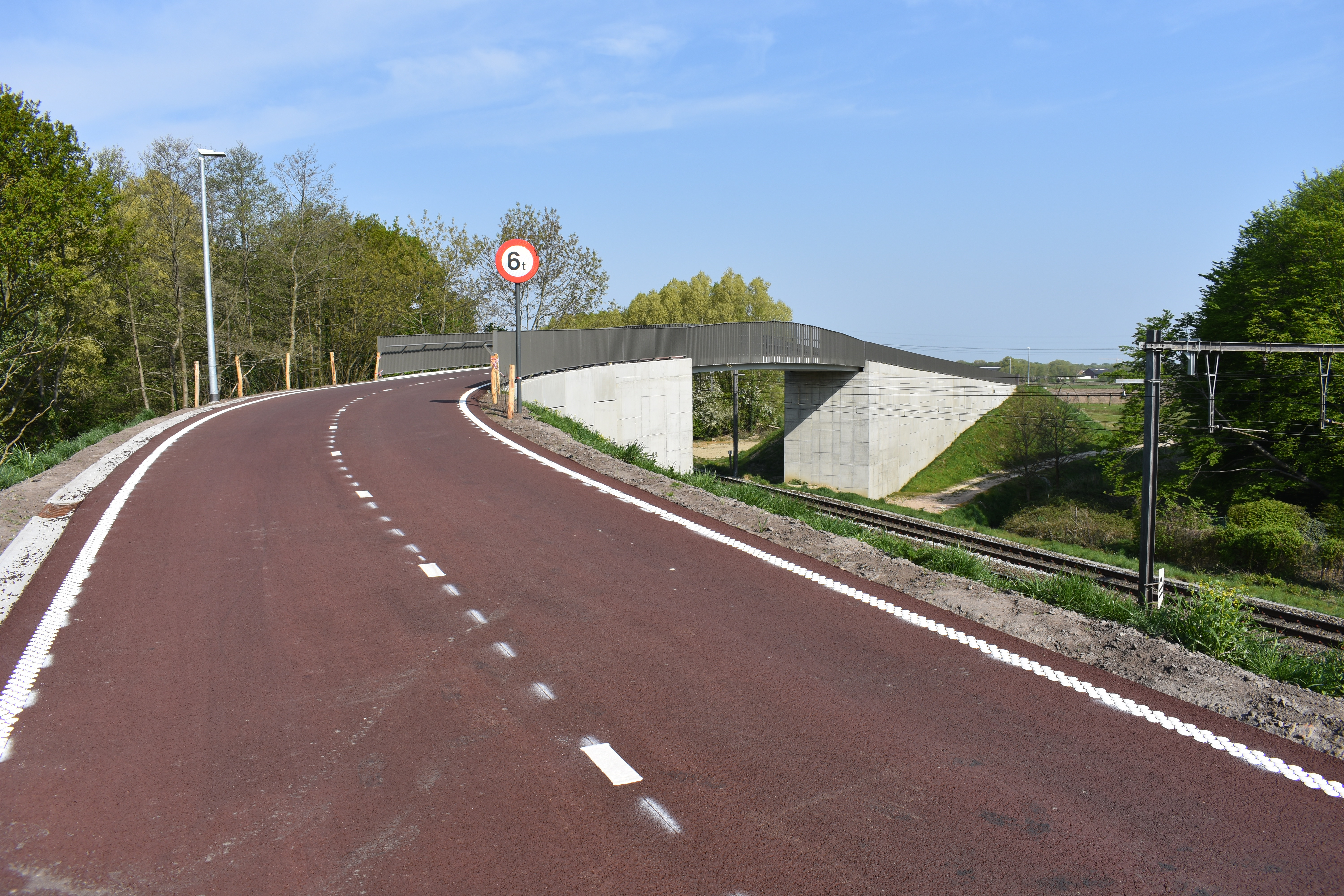 Fietssnelweg F11 Antwerpen-Mortsel-Boechout-Lier. Brug over spoorlijn 15 te Mortsel, Park Savelkoul